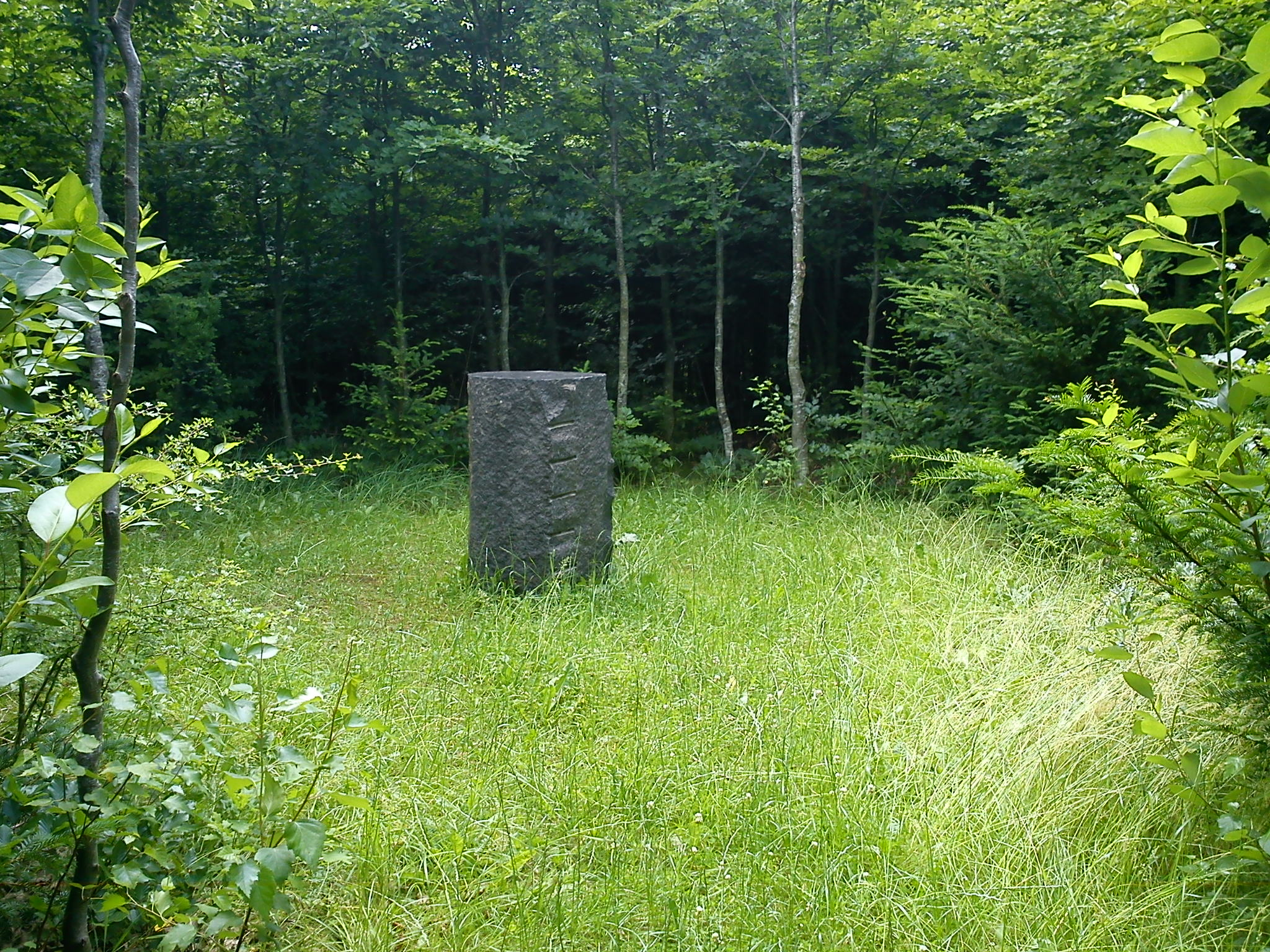 Vinterens Hjerte i en lysning midt i True Skov.